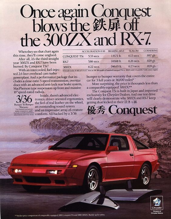 Extrait du Magasine GEO anglais